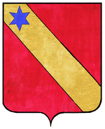 Blason de segneurie